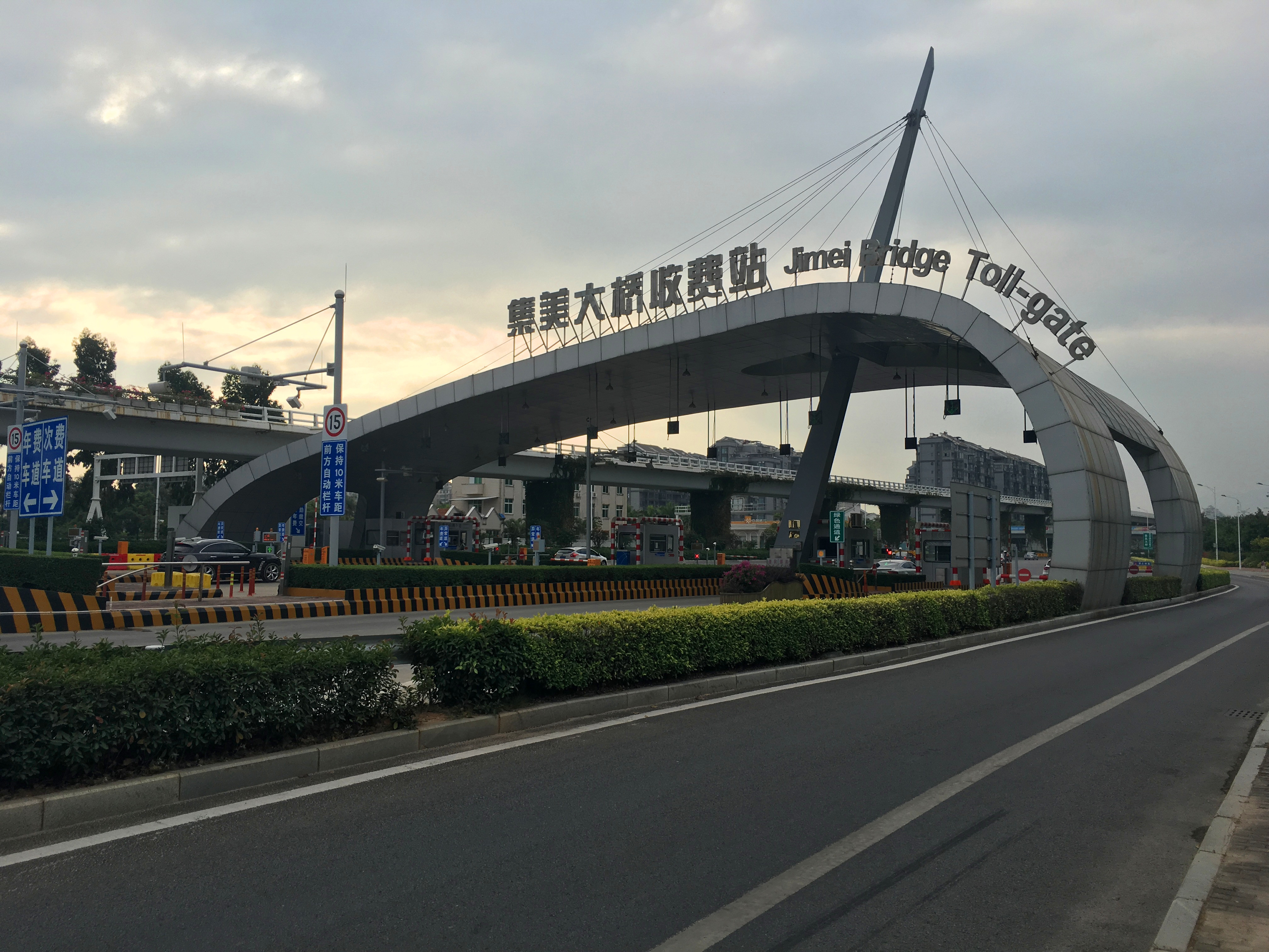 中文（中国大陆）: 集美大桥收费站